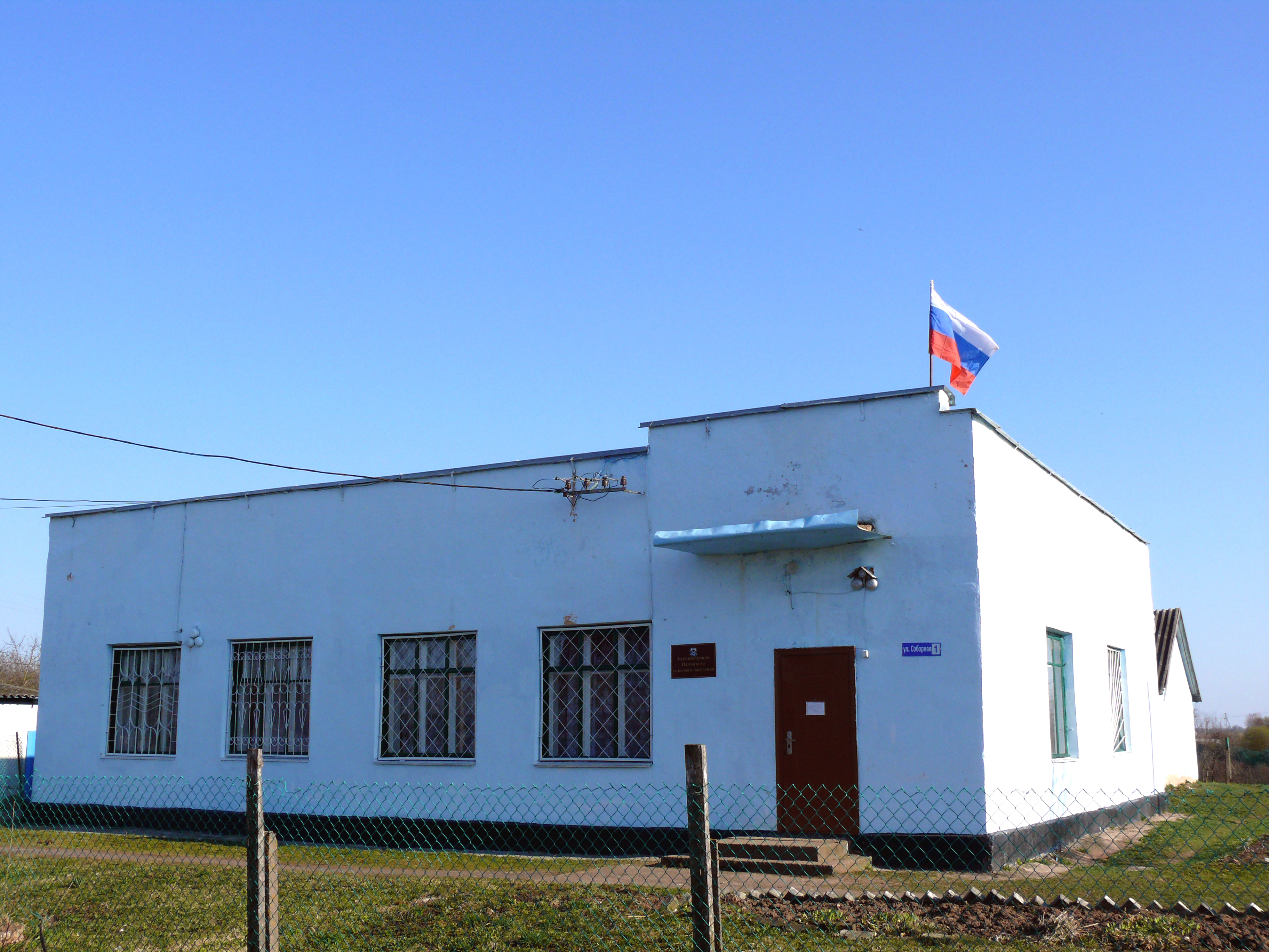 Администрация Наговского сельского поселения. Деревня Нагово Старорусского района Новгородской области